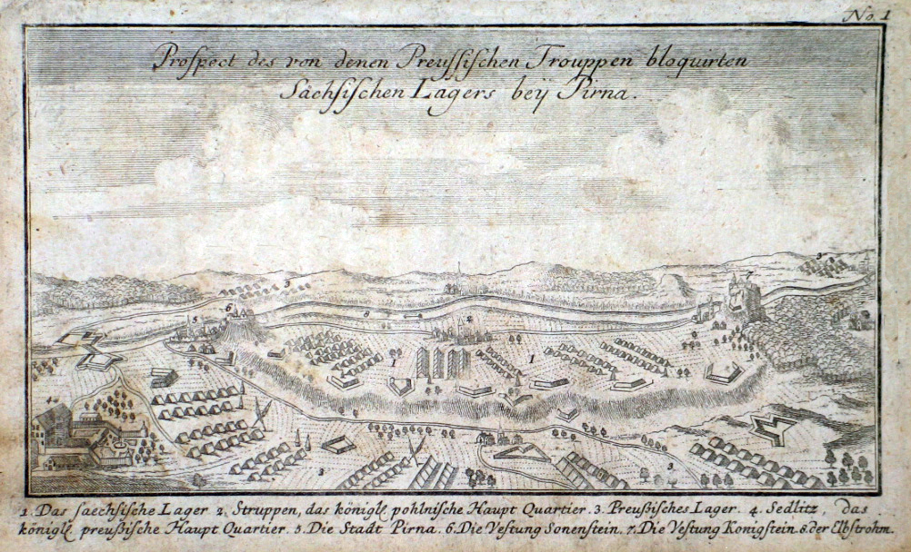 Prospect des von denen Preussischen Trouppen bloquirten Sächsischen Lagers bey Pirna